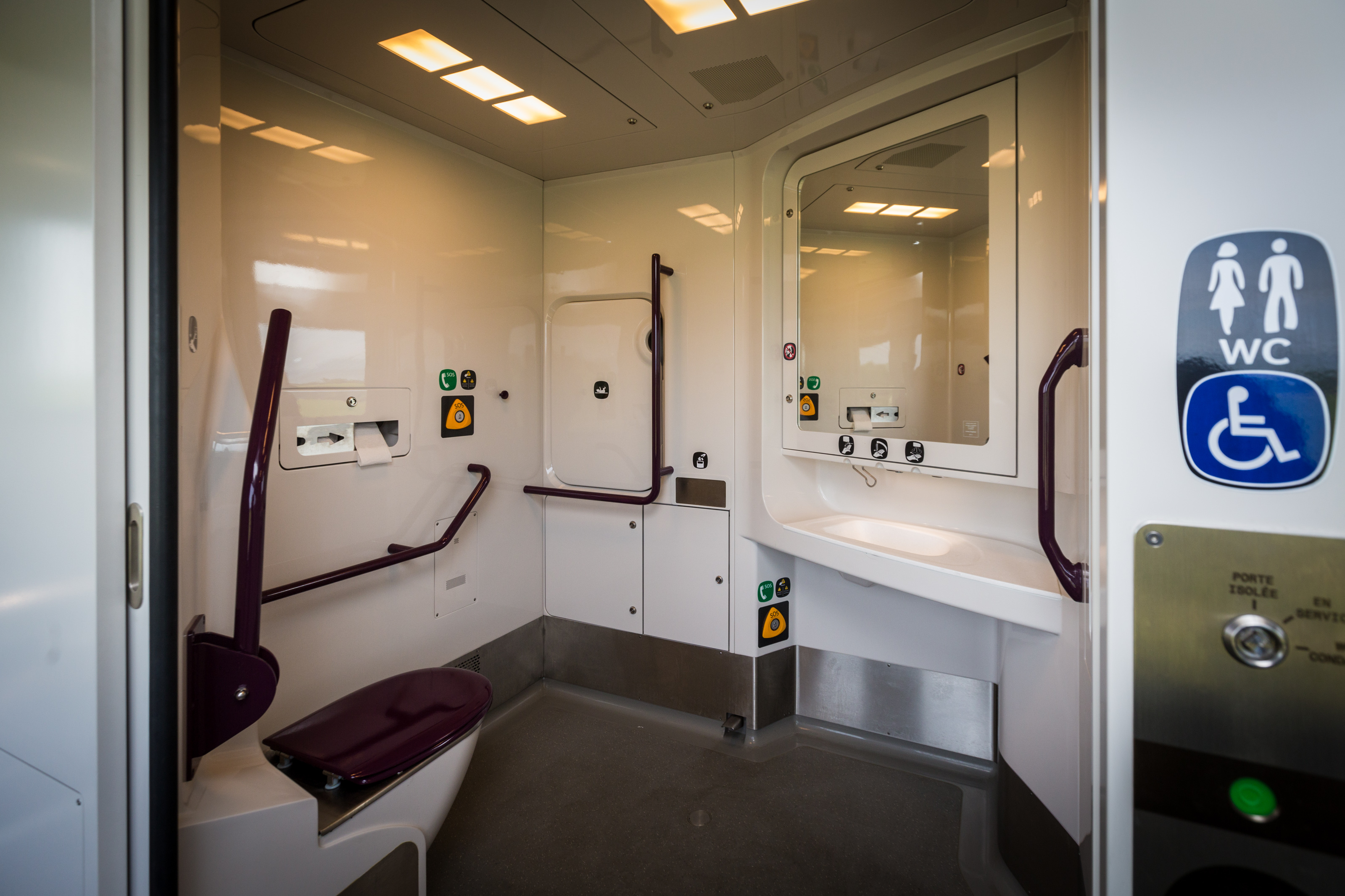 Régiolis 83511 TER Alsace 28 mai 2015